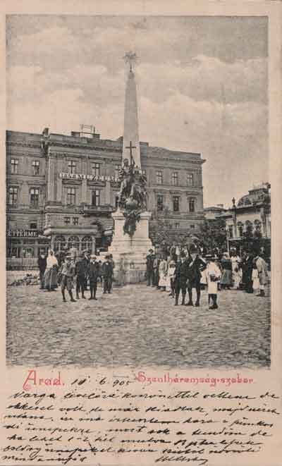 Aradi Szentháromság-szobor régi képeslapon